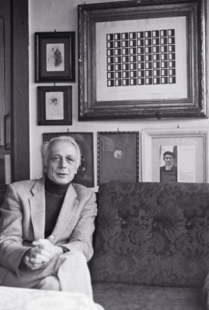 Manfred Luther im Wohnzimmer